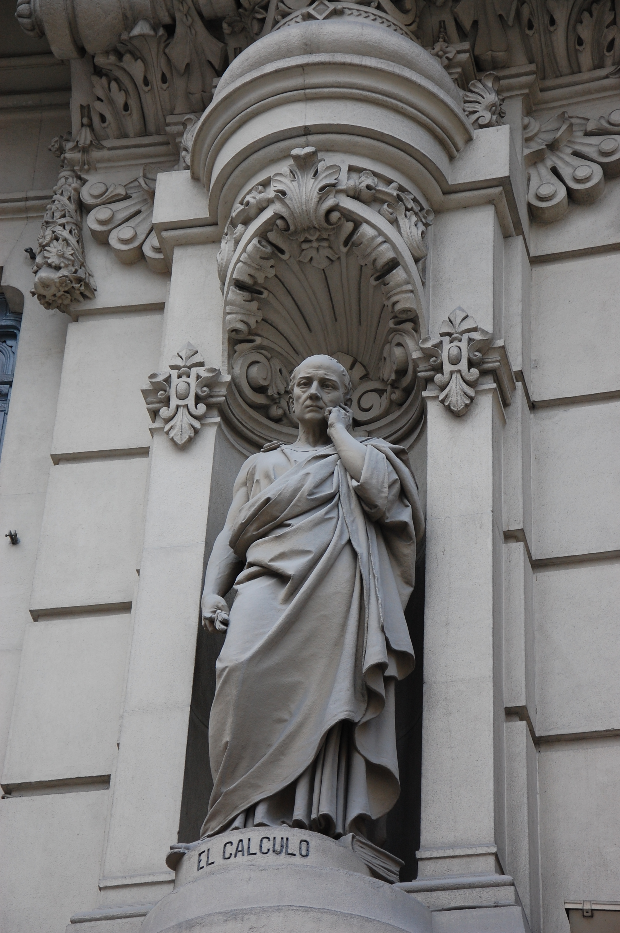 Estatua representando "el cálculo" en la fachada del edificio del Banco Central Hispano en Madrid.